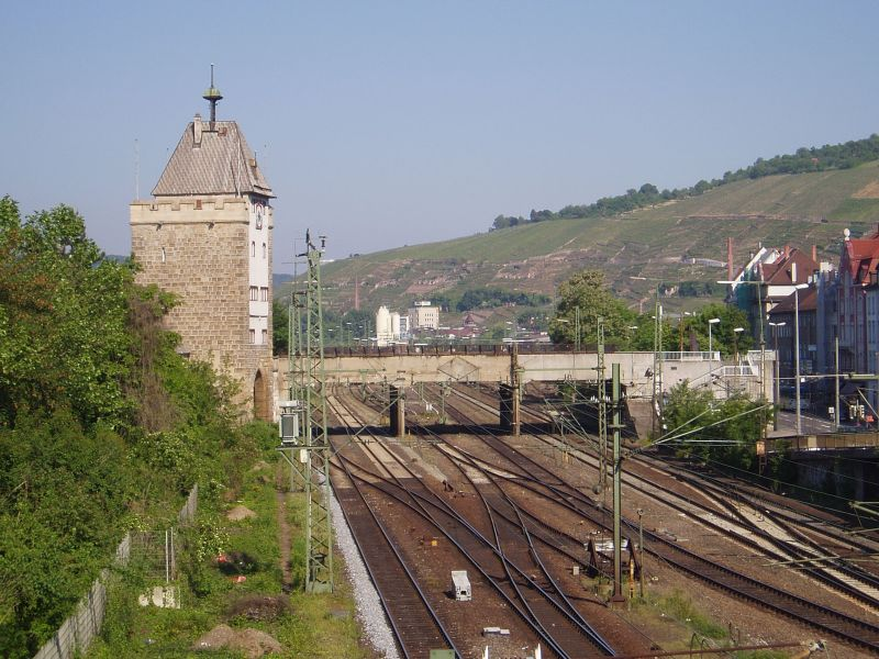 Esslingen am Neckar - Ehemalige Eisenbahnbrücke am Pliensauturm